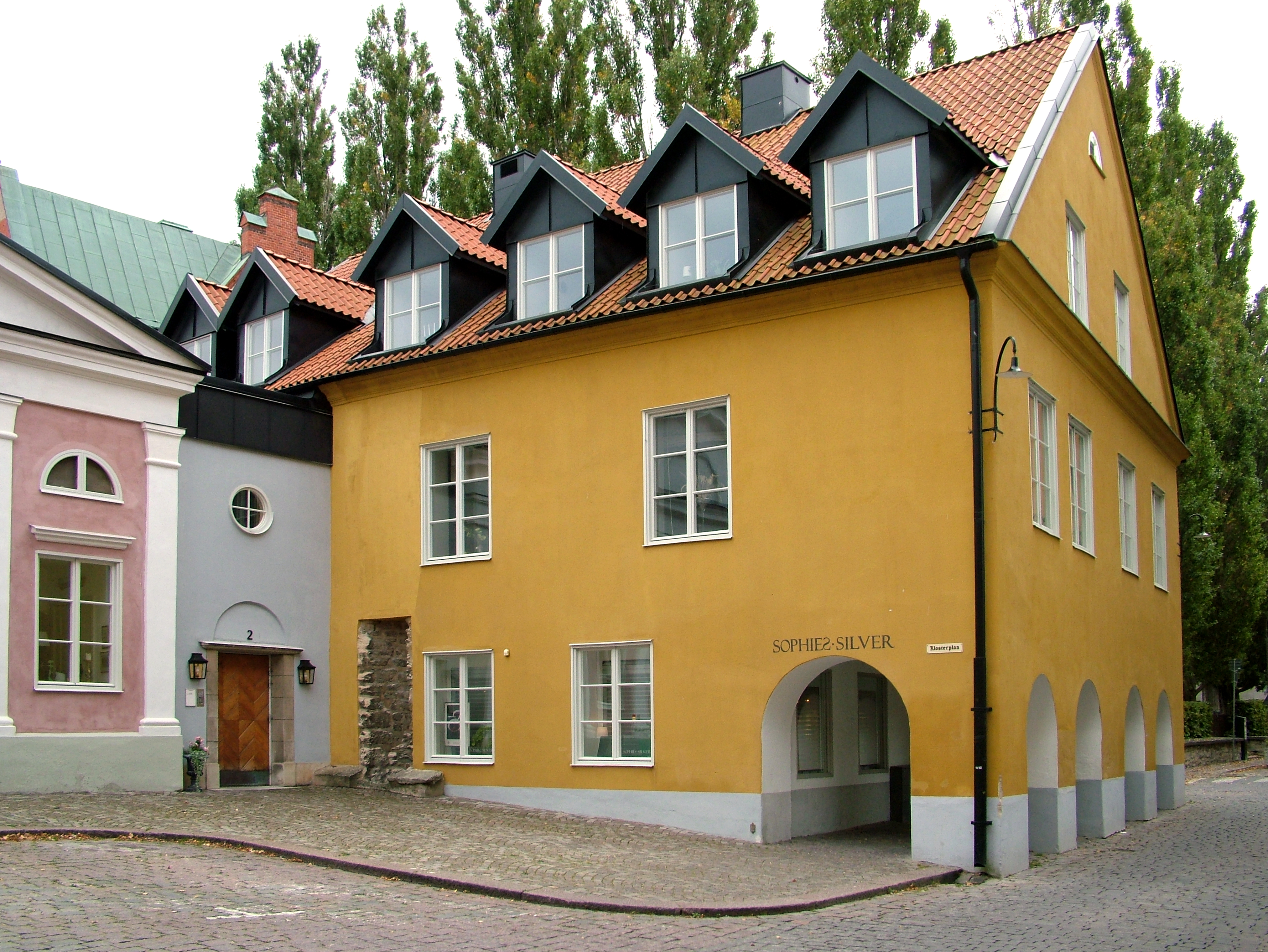 Norra fasaden mot Klosterplan. Till vänster skymtar en del av det gamla polishuset på Klosterplan 2. Den gamla brunnen, numera igensatt, på torget syns i vinkeln mellan husen.